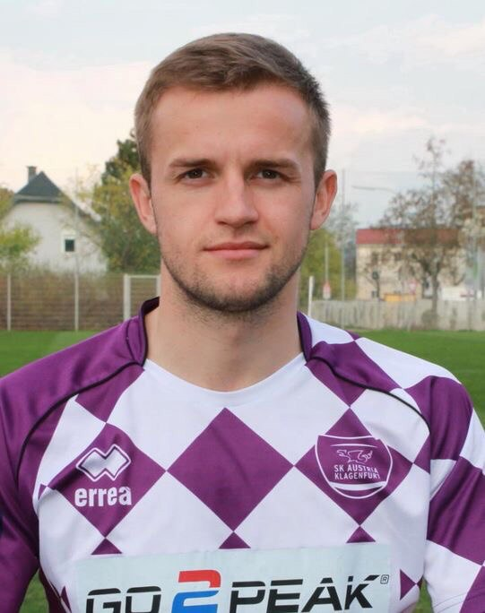 Роман Ярославович Бобак.